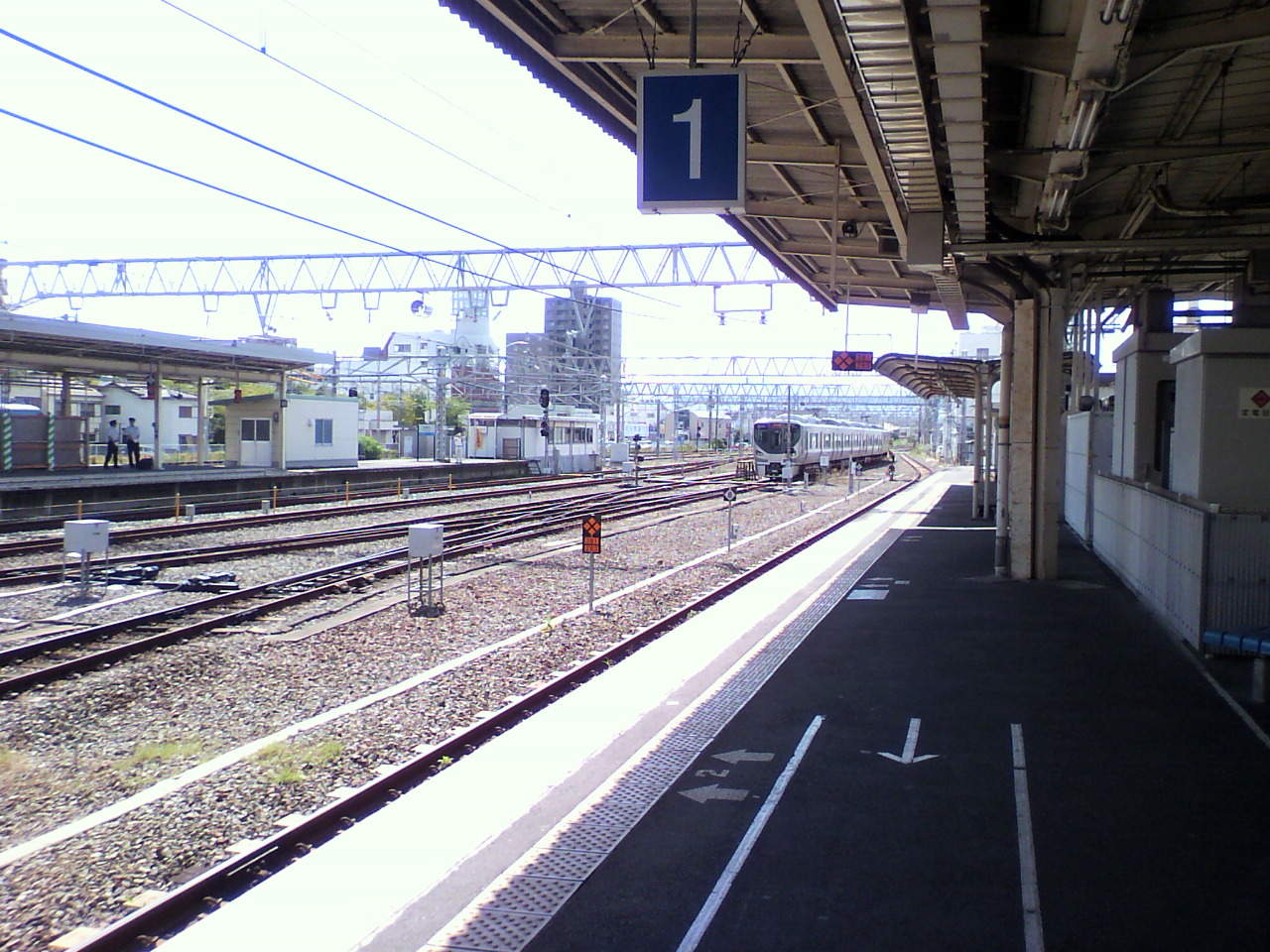 和歌山駅1番線ホームから